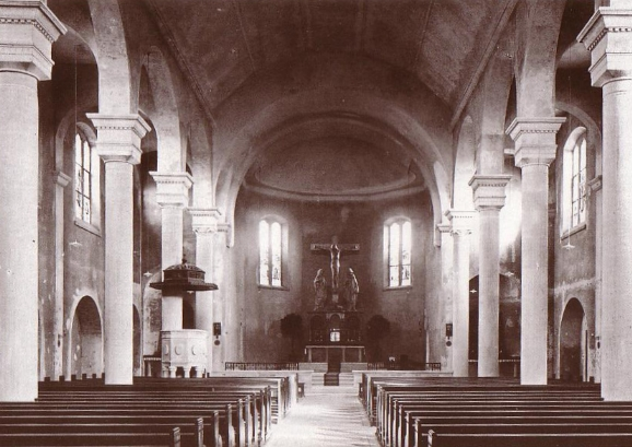 St. Laurentius Aschaffenburg Leider - Innenansicht 1923 zur Einweihung